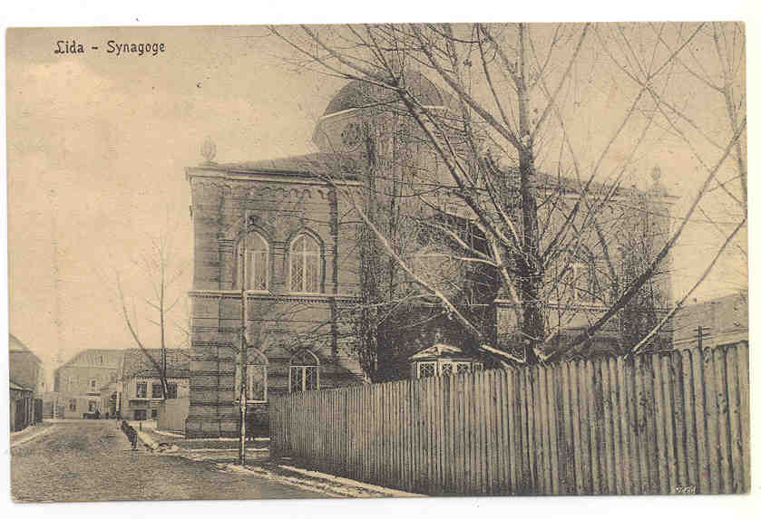 Беларуская (тарашкевіца): Ліда (Lida). Сынагога